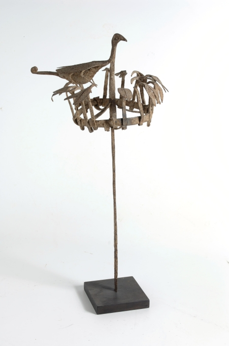 Deze 'opa osanyin' heeft een centrale figuur met daaromheen naar binnengekeerde vogels. De staf wordt gebruikt in het bestrijden van hekserij, m.b.v. de kracht in kruiden, Osun. De staf bevestigt de esoterische kennis van de Obo-priester, waarmee hij kruiden in medicijnen tegen de gevolgen van hekserij en tegen heksen. De heksen transformeren zichzelf in vogels. Tevens is de staf het centrum van Ogun, god van ijzer, en belangrijk voor krijgers, jagers en ambachtslieden. ZIjn kracht wordt geassocieerd met bloed, vlammen, wraakzucht en oorlog ((Lerer, 1993:25). De Yoruba zijn het meest urbane Afrikaanse volk. Al vanaf de 11e eeuw was hun eerste stad, Ile-Ife, het centrum van een invloedrijke stadstaat, en gauw volgden andere stadstaten met bruisende centra. Deze ontwikkeling heeft zich tot de dag van vandaag voortgezet. De Yoruba cultuur heeft nauwe raakvlakken met die van de Fon in zuidelijk Benin en Togo. Hun politieke systemen en religieuze werelden zijn vrijwel identiek, en ook de kunsten van beide groepen tonen wederzijdse beïnvloeding. Veel van de objecten worden gebruikt in de religie en voor het onderschrijven van de leiderschapssystemen van het koninklijke hof en van de ouderengenootschappen, de Ogboni. Deze genootschappen, met zowel mannelijke als vrouwelijke leden, regeren samen met de koning. Ogboni moet machtsmisbruik door de koning voorkomen, fungeren als rechtbank en spelen een hoofdrol bij het kiezen, inaugureren maar ook begraven van koningen.